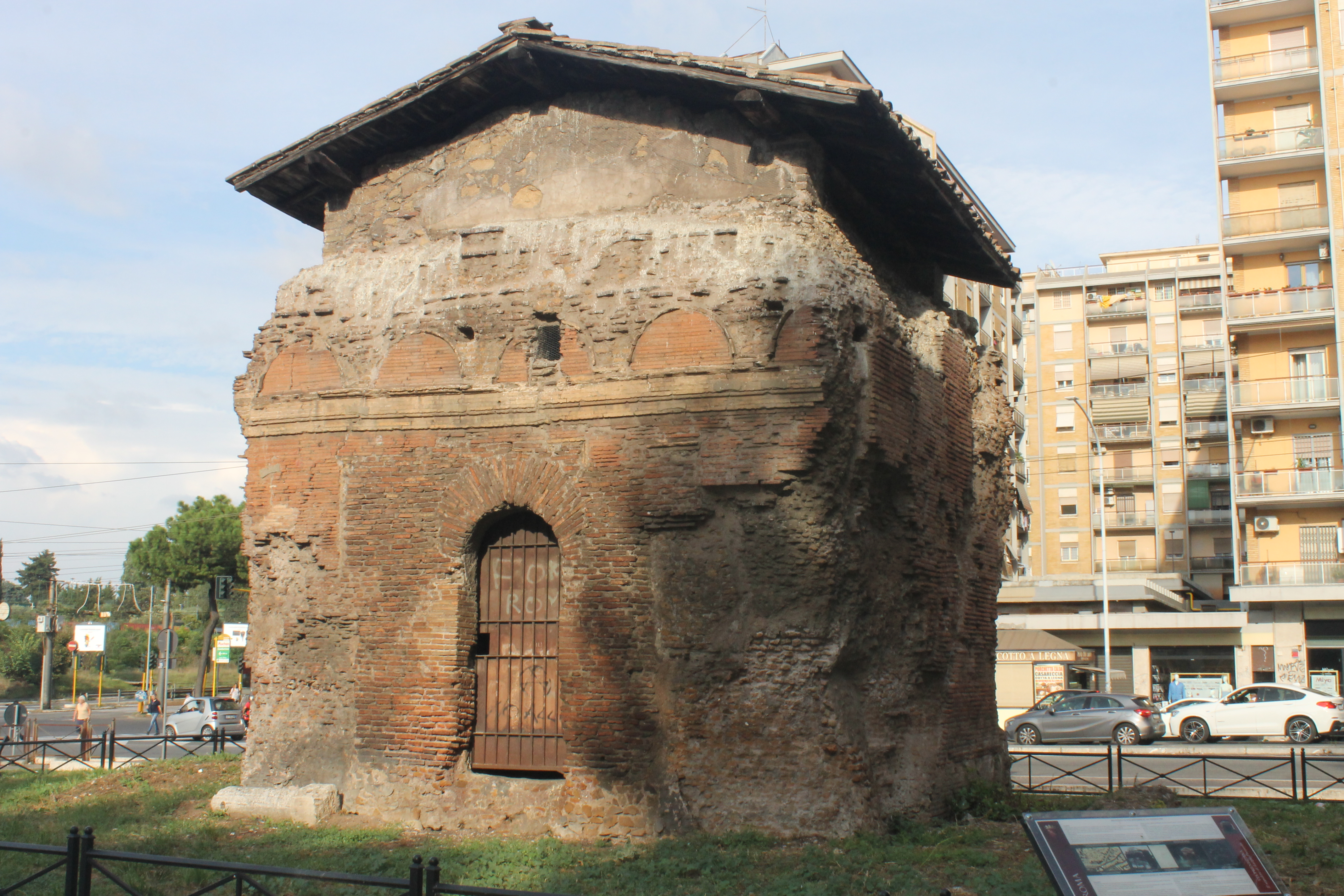 Sepolcro presso Largo Preneste in Roma This is a photo of a monument which is part of cultural heritage of Italy.